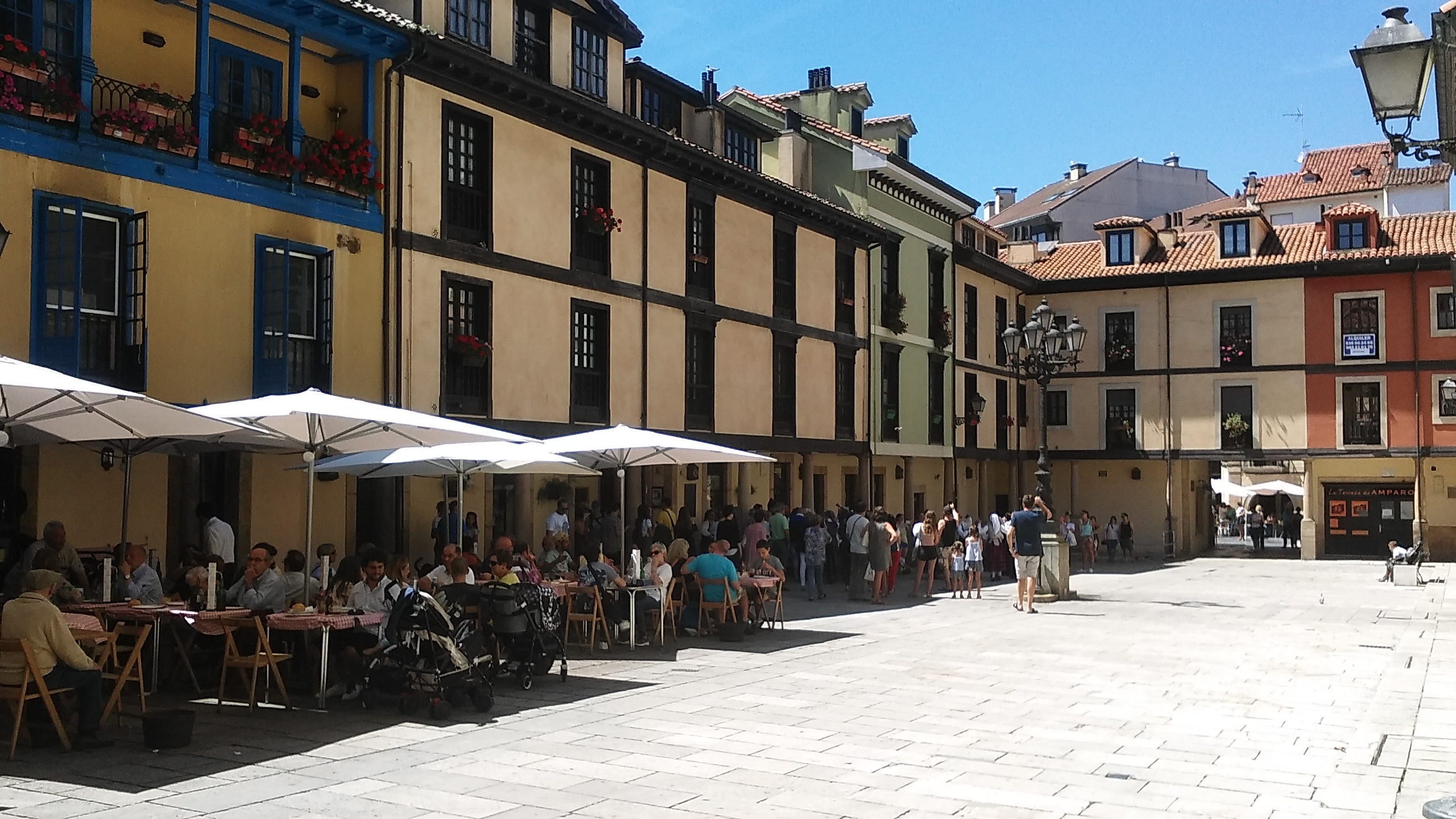 Plaza del Fontán (Oviedo).